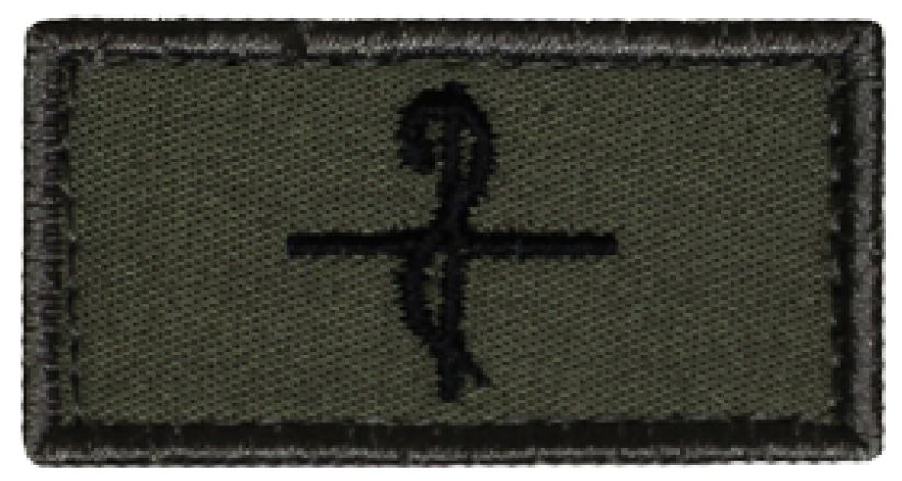 Betreuunssanitäter